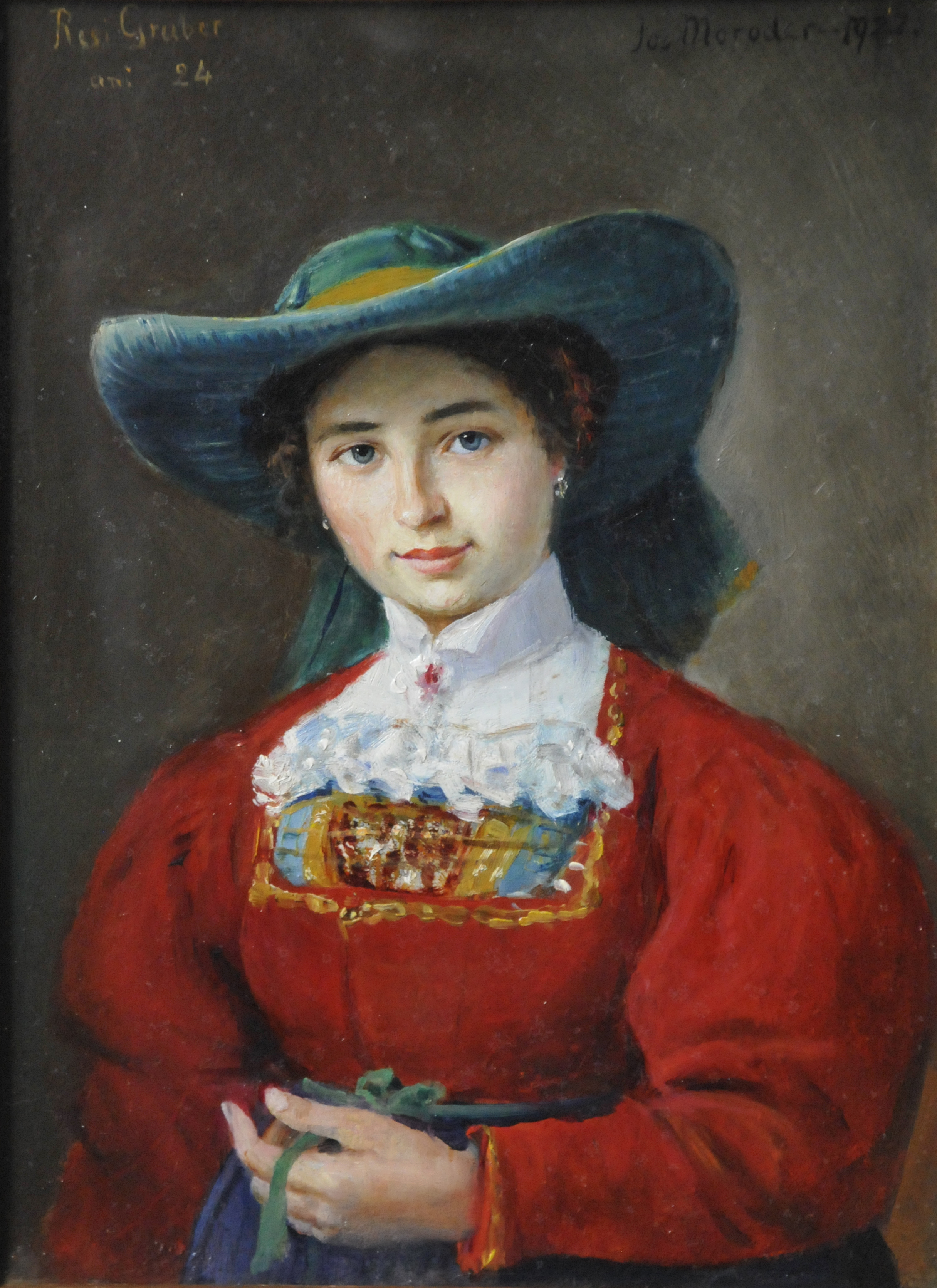 Tresl Gruber, artist from Val Gardena